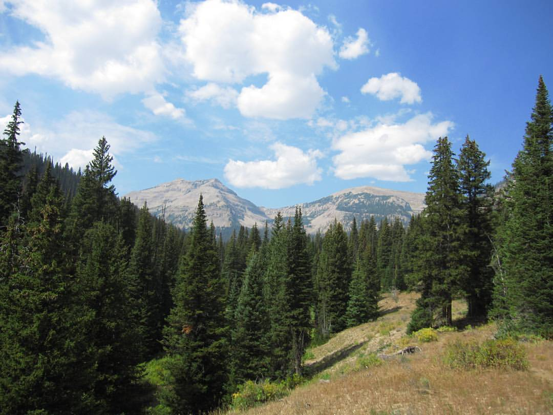 Bannock Peak in Gallatin Range